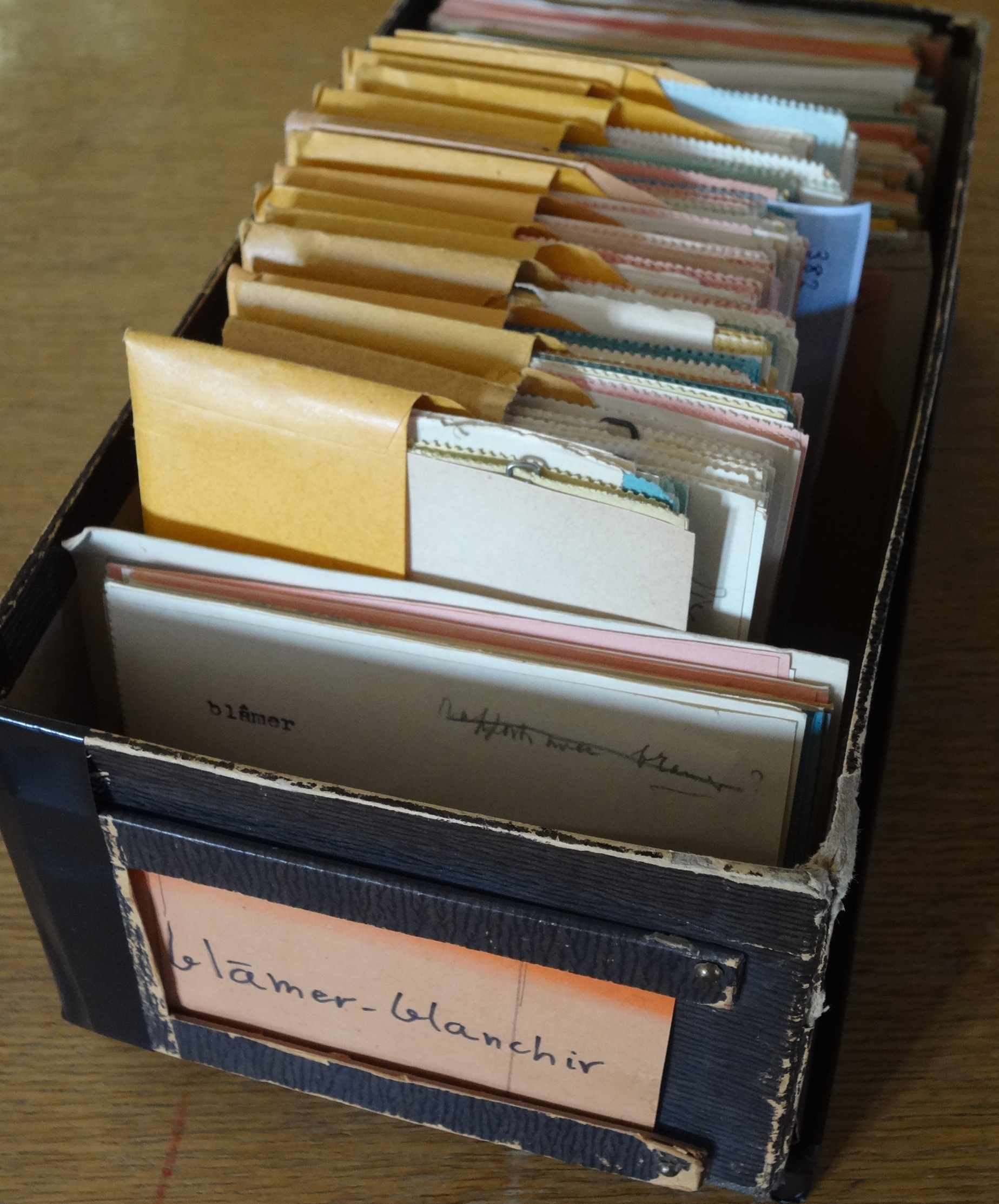 Une boîte de fiches « correspondant » du Glossaire des patois de la Suisse romande. Enquête lexicographique 1900-1910. Boîte dans laquelle on trouve les fiches regroupées sous le titre « Blanc », parmi d'autres.